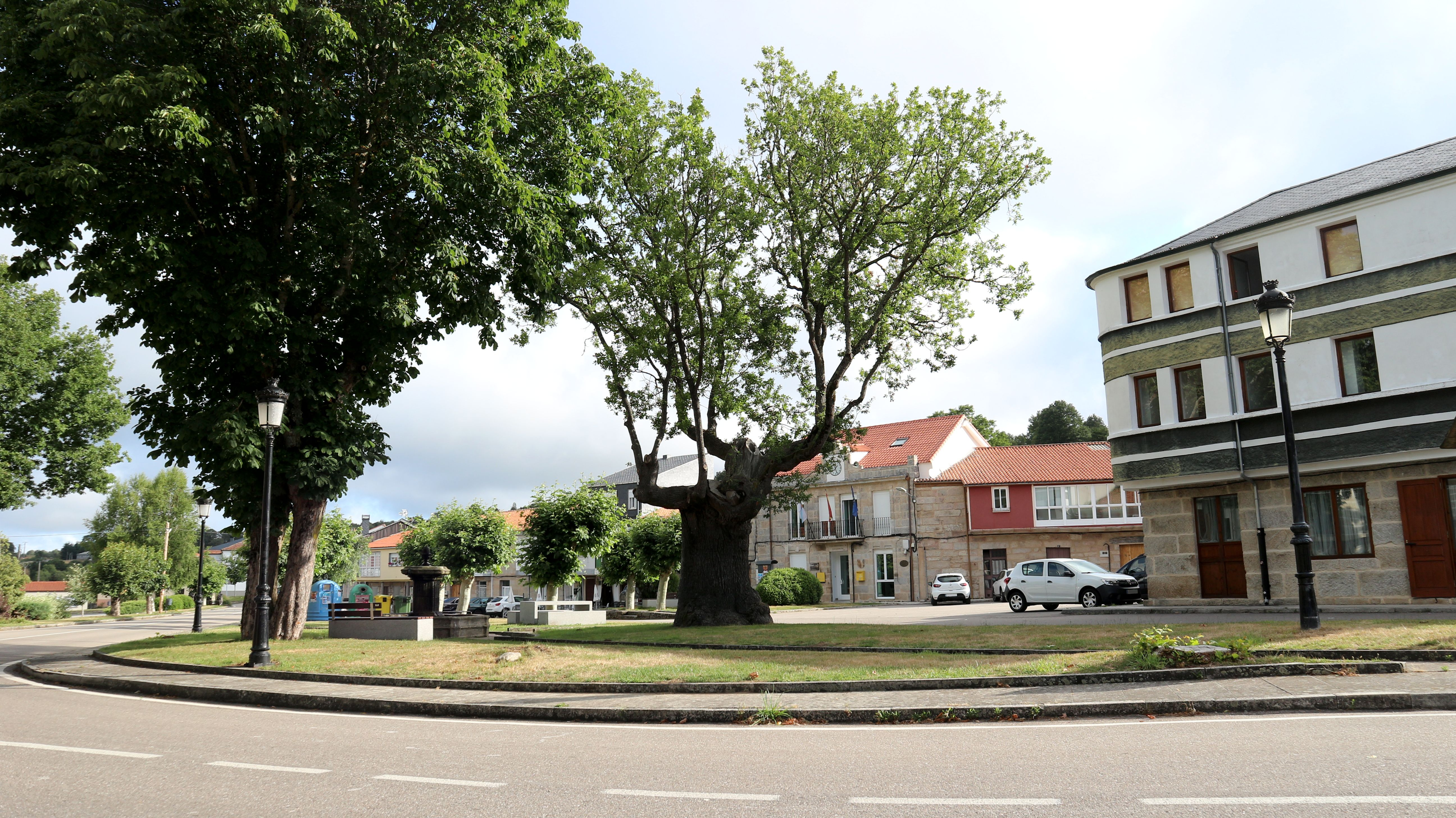 Praza e Concello de Montederramo. Montederramo, Montederramo.